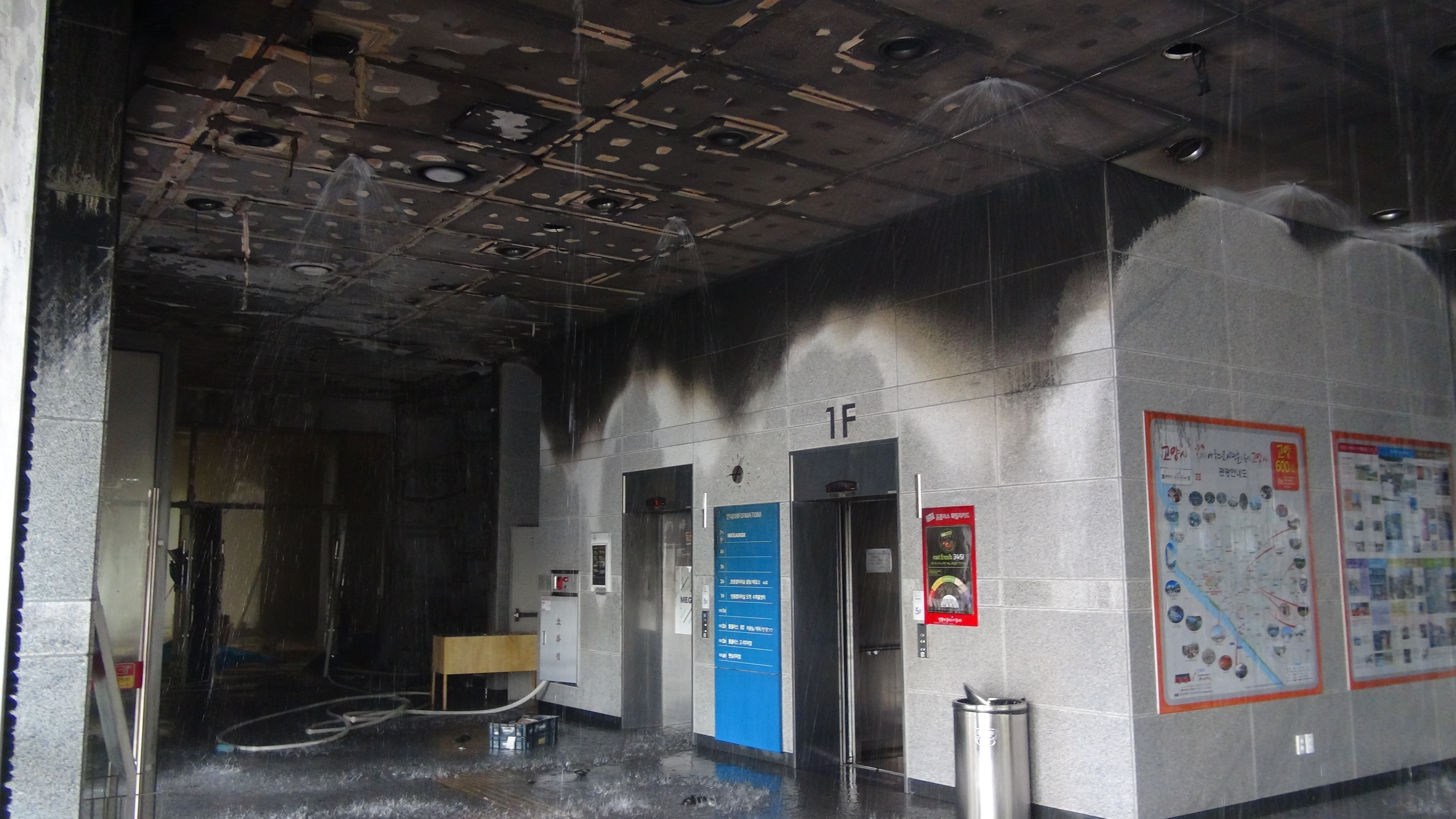 2014년 5월 26일 고양종합터미널 화재 사고